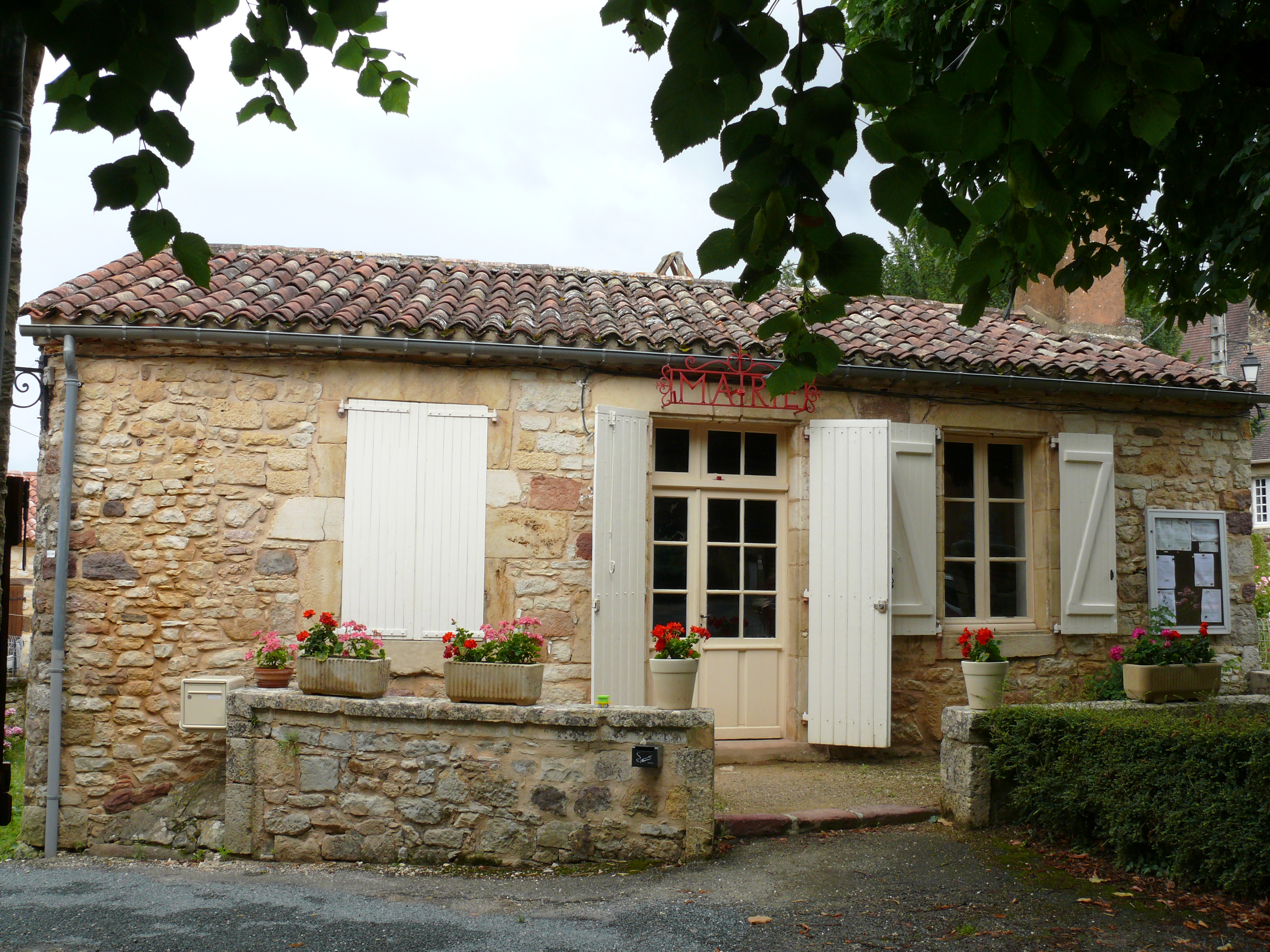 Saint-Laurent-la-Vallée - Mairie